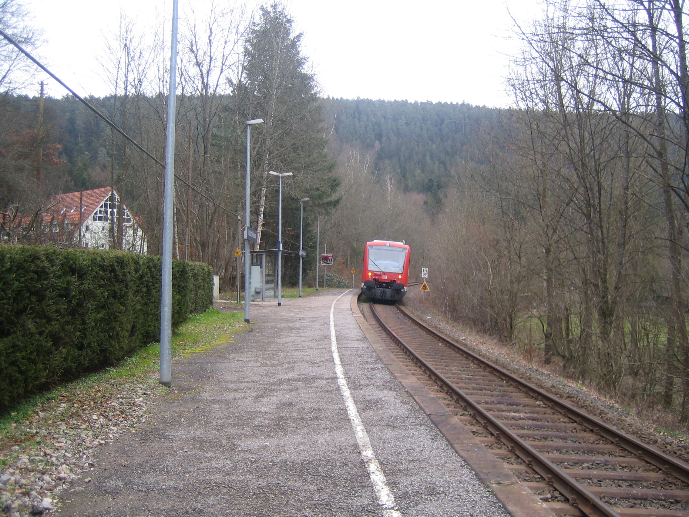 Zug bei der Ausfahrt aus dem Hp. Monbach-Neuhausen